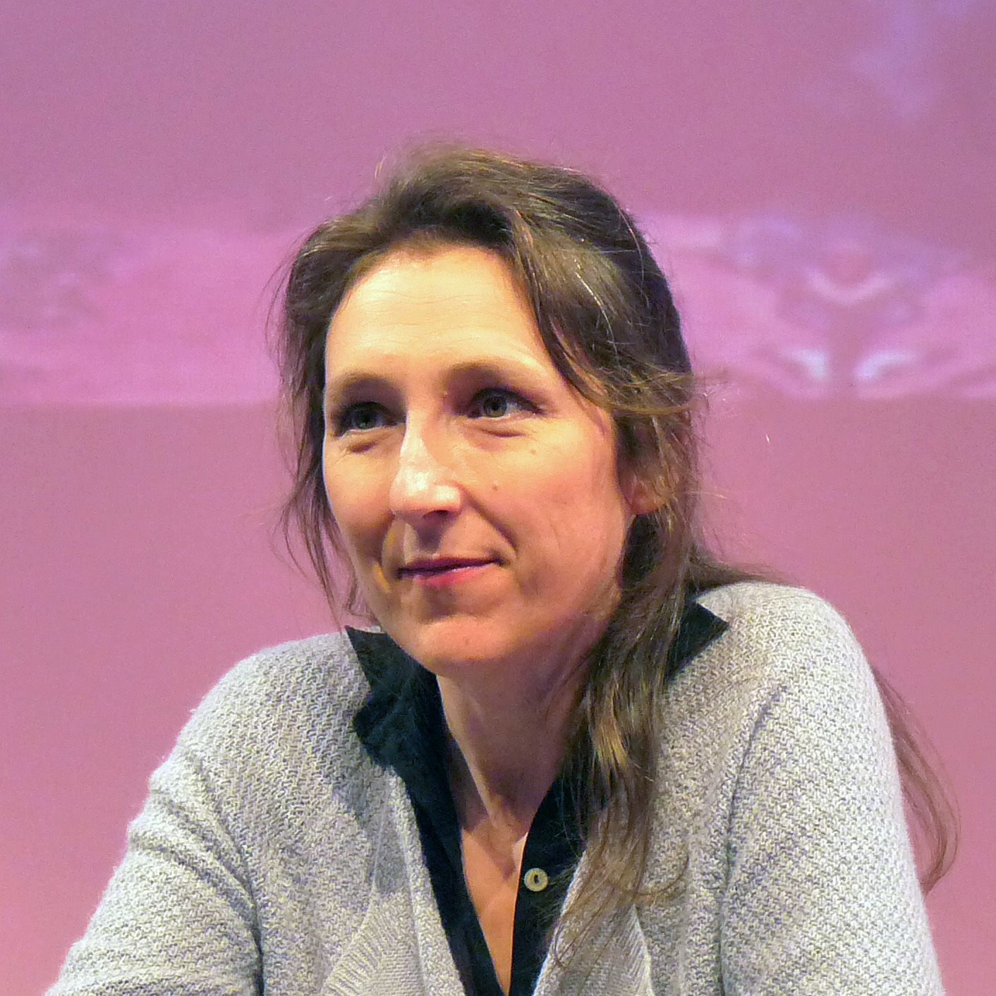 Marie Darrieussecq présentant son ouvrage Clèves dans le cadre de la semaine littéraire Bibliothèques idéales (Aubette, Strasbourg).